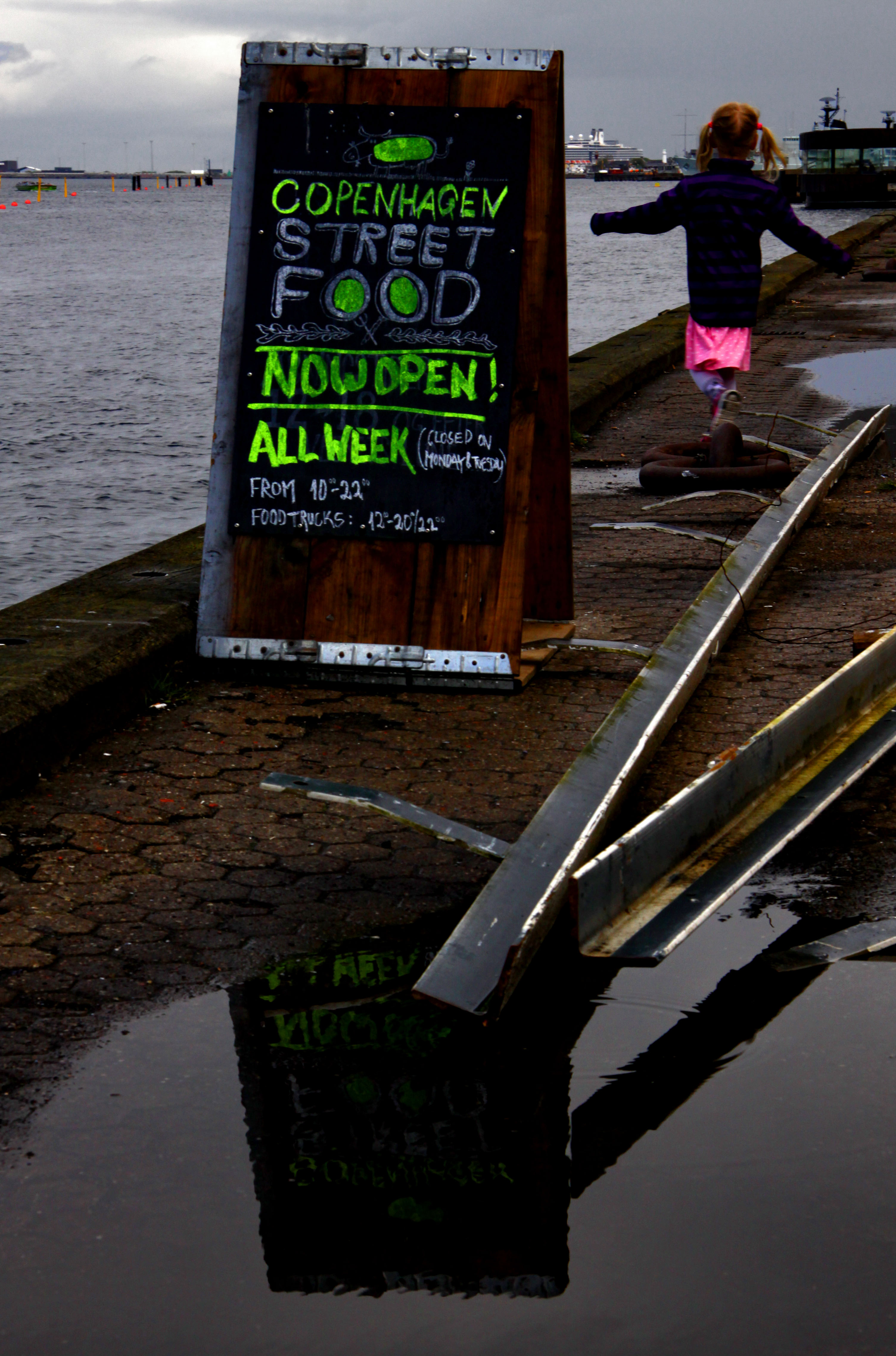 København / Copenhagen. På Papirøen.